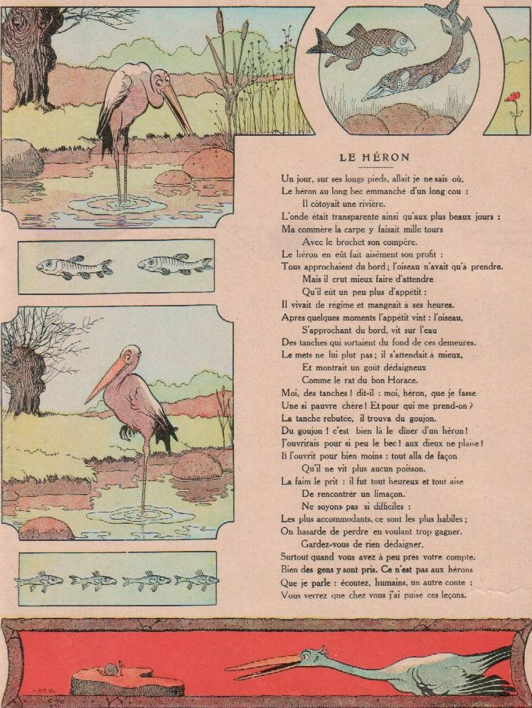 La Fontaine, Le héron, illustration par Benjamin Rabier, 1909, scan d'un album de famille